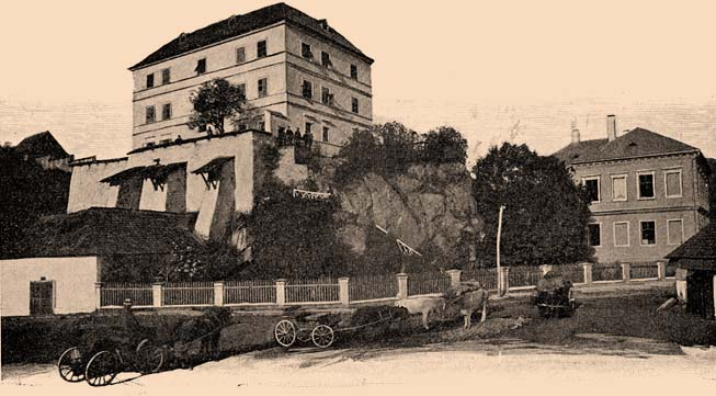 Zsarnócza. - A Dóczy-féle várkastély.